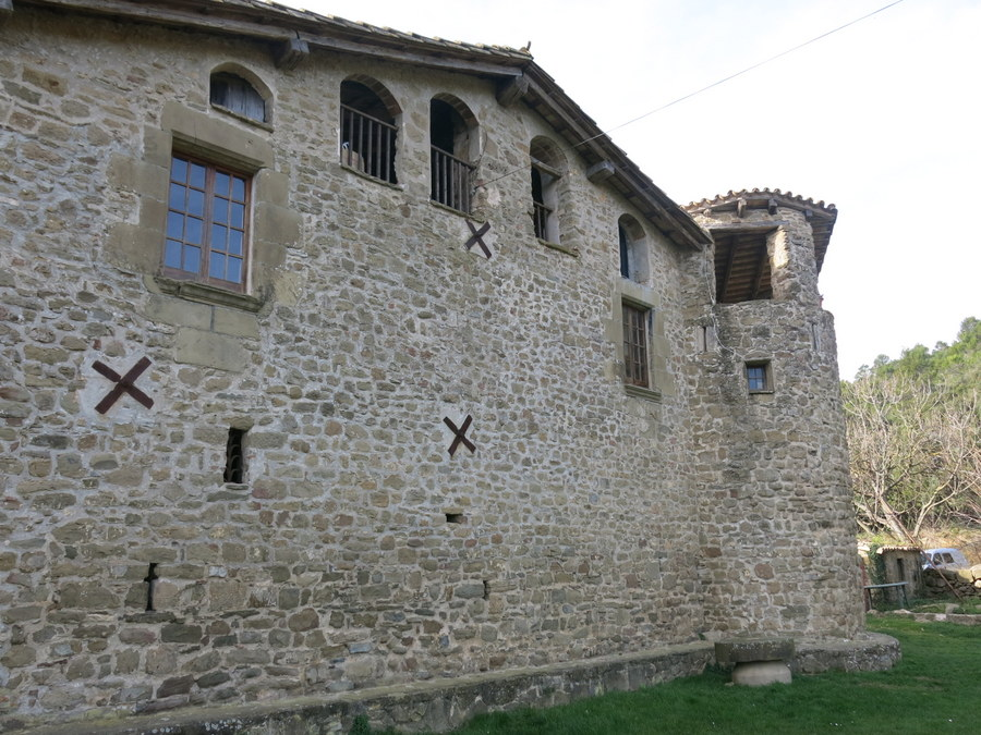 castell de Pujarnol, comarca del Pla de l'Estany / Catalunya